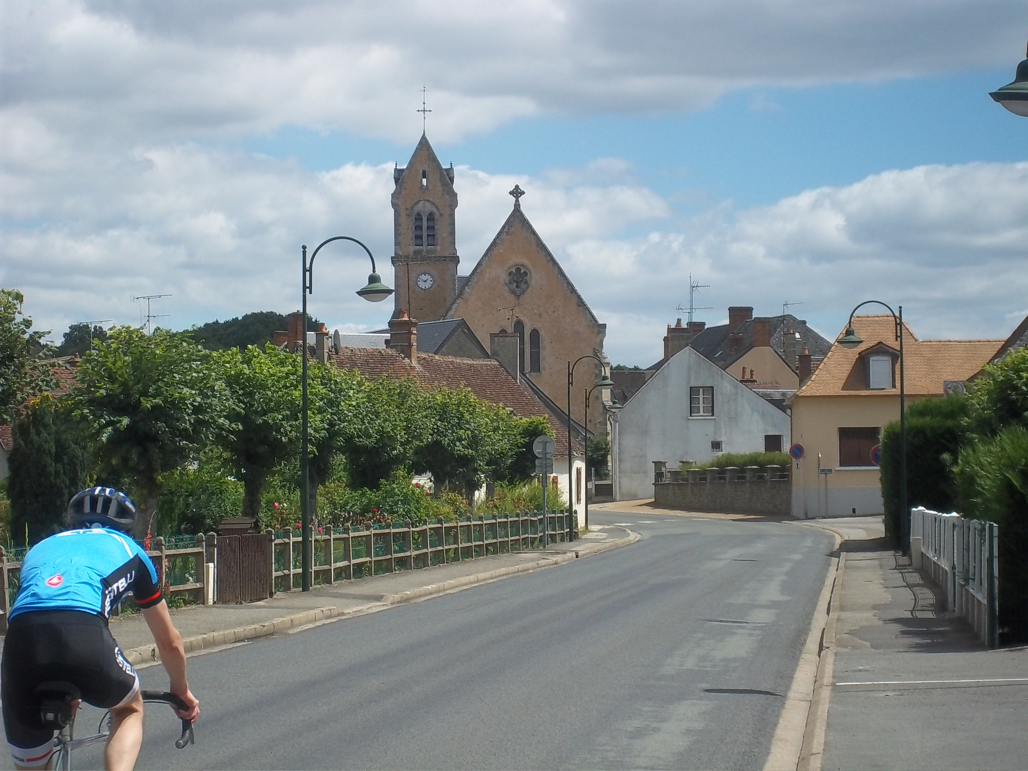 Le Luard - Sarthe - l'Eglise